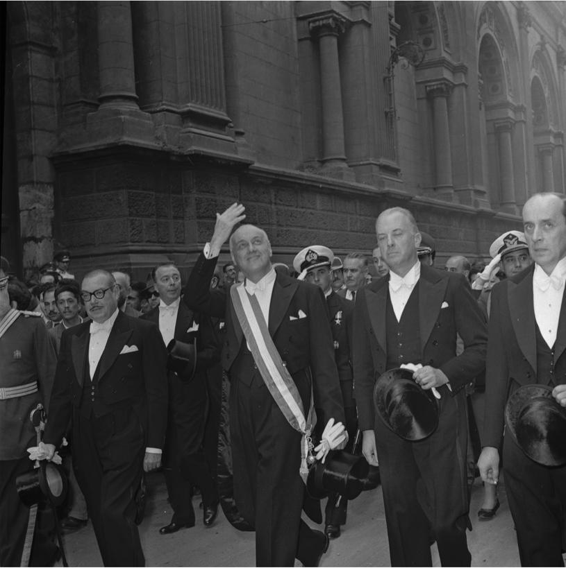 Sin fecha. S. E. el Presidente Jorge Alessandri Rodríguez, acompañado de altas autoridades, camino a la catedral de Santiago.